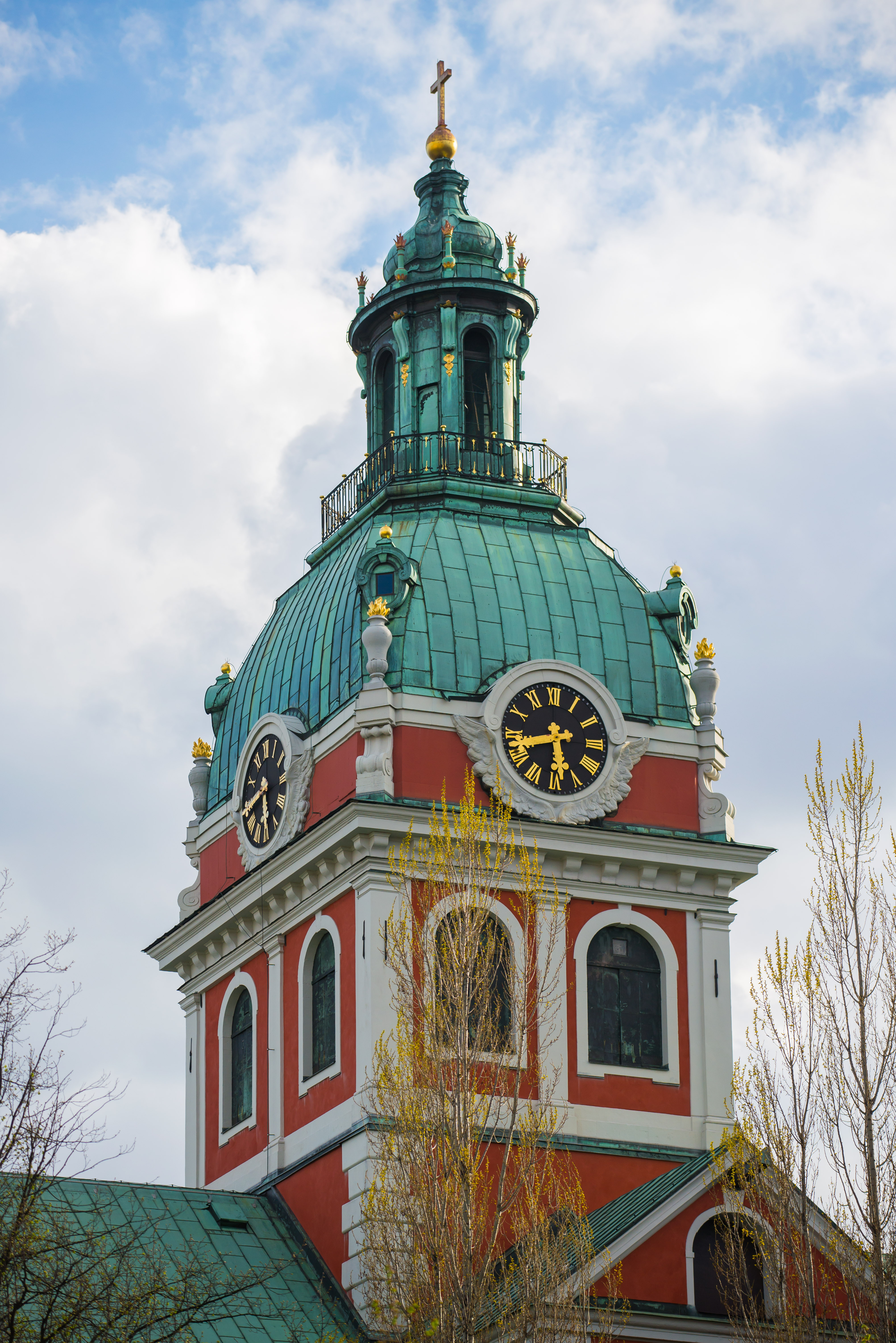 Sankt Jacobs kyrka i Stockholm den 6 maj 2015.